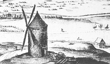 Lindener Turm als Ausschnitt des Merian-Stiches von Hannover 1654